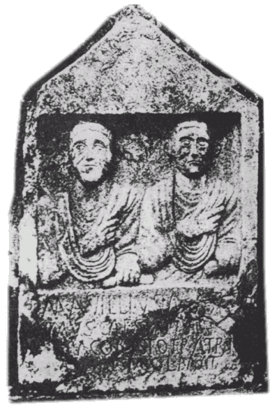 Edicola funeraria datata all'epoca Romana; luogo: Nusco, Campania, Italia.